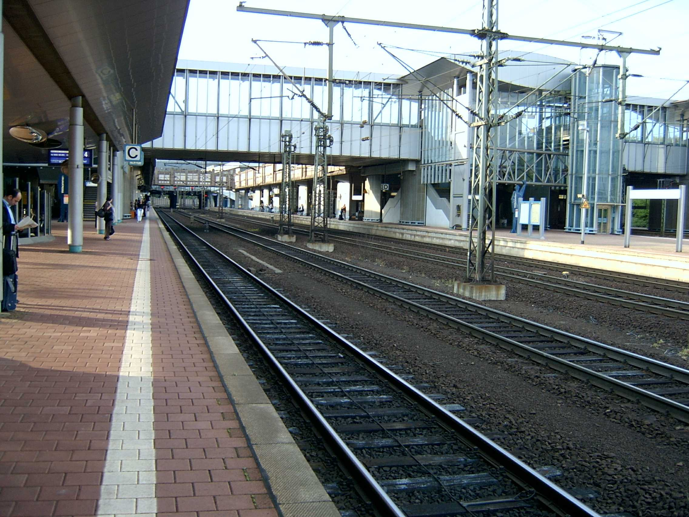 Bahnhof Kassel-Wilhelmshöhe erstellt von: Sicherlich